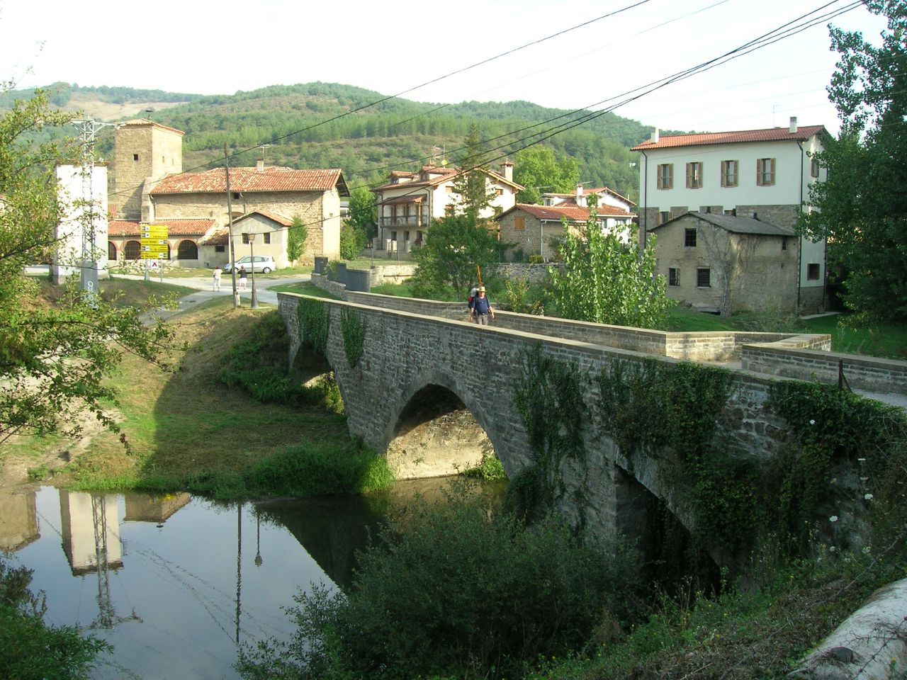 Puente gótico de Larrasoaña sobre el río Arga.